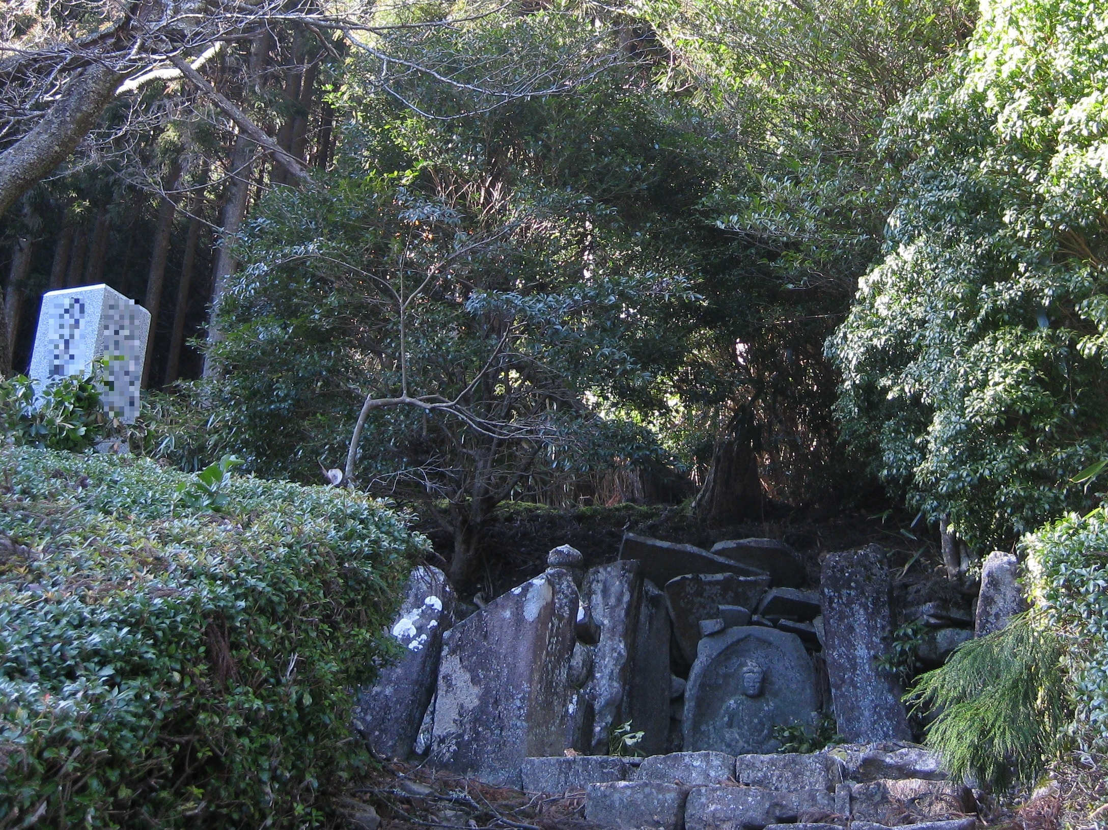 三重県津市美杉町太郎生にある日神石仏群を入り口から撮影した写真です。 この場所の中心となる阿弥陀如来坐像が右下に見えています。